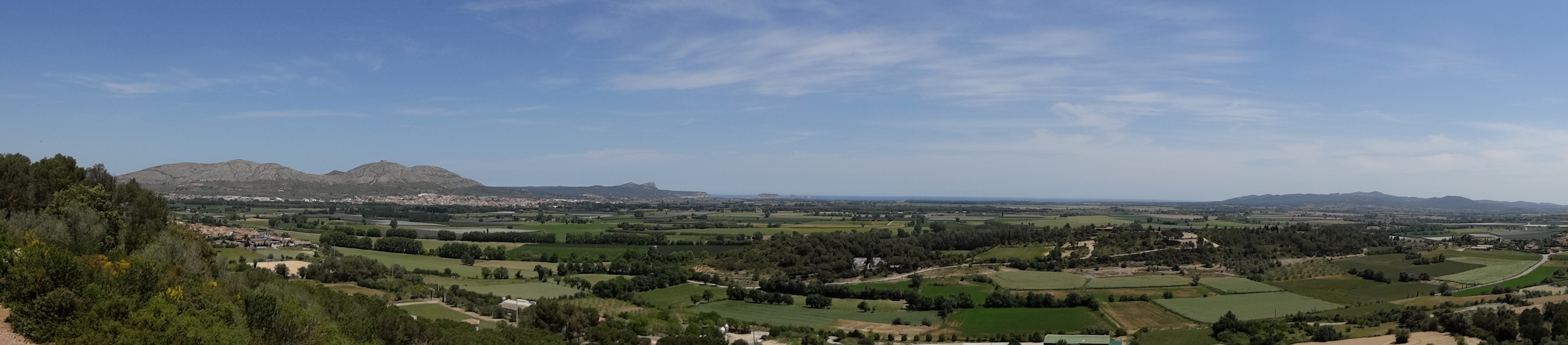 El Montgrí, les Illes Medes i el Baix Ter This is a a photo of a natural area in Catalonia, Spain, with id: ES510281